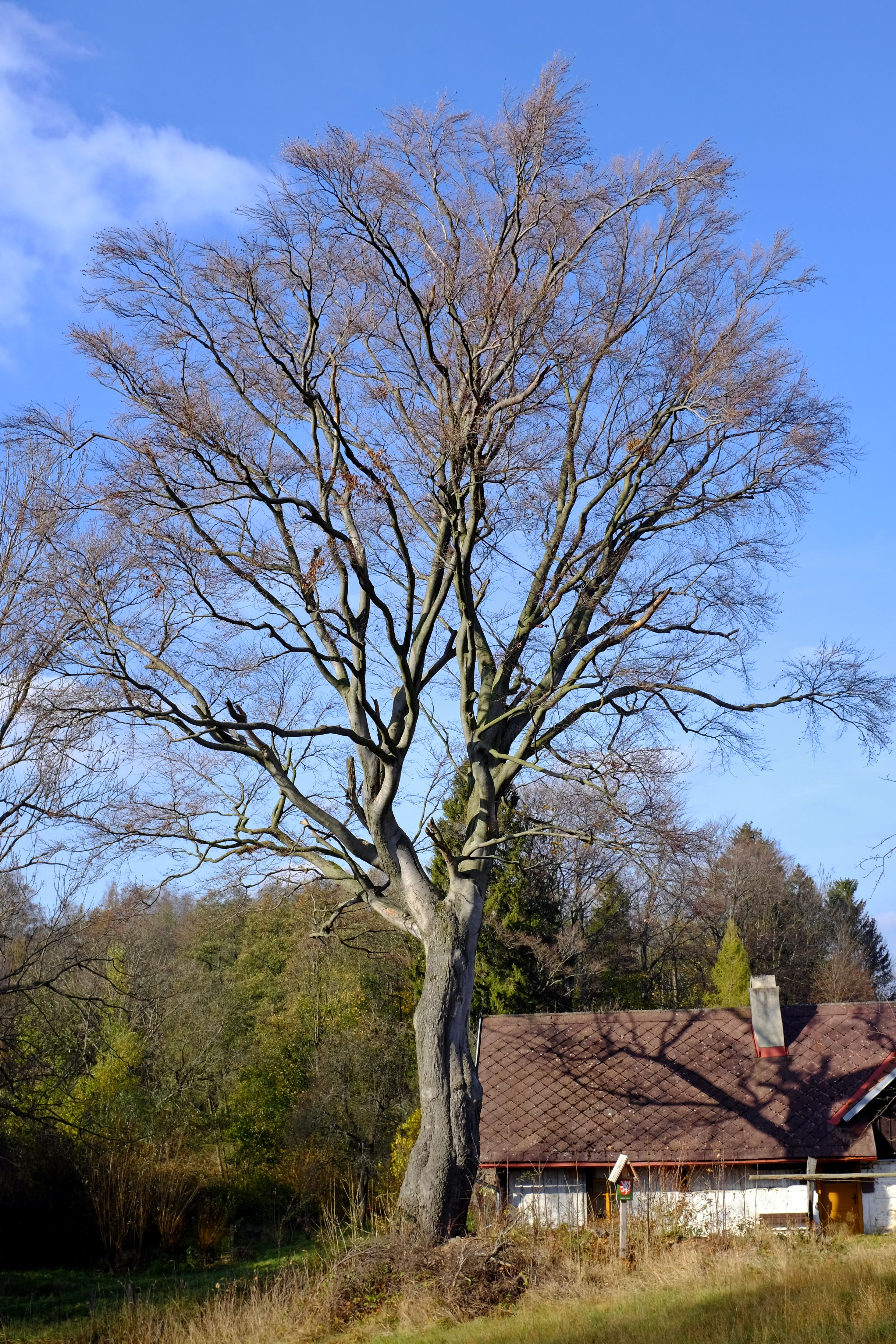 Památný strom - Buk lesní Františky - okres Chrudim